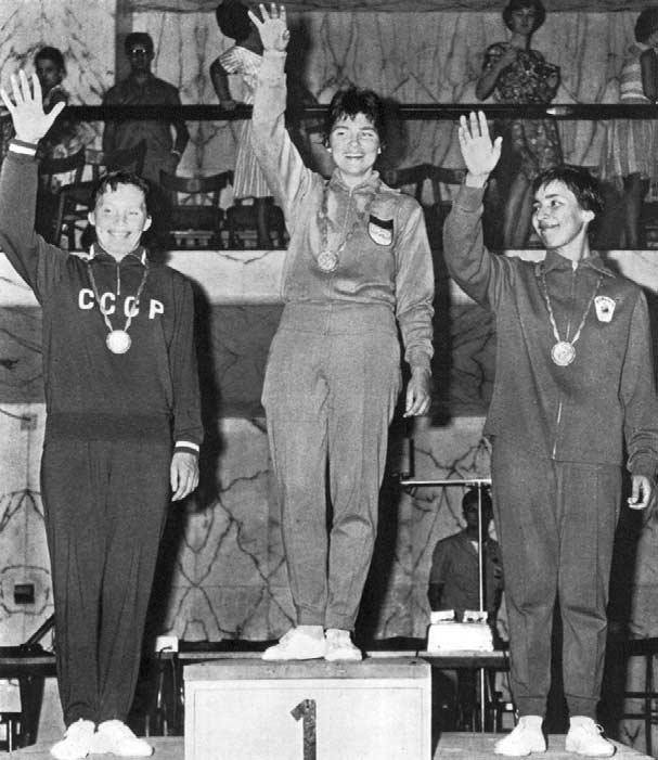 Il podio della competizione femminile di fioretto al torneo olimpico di scherma al Palazzo dei Congressi di Roma; sul gradino più alto la tedesca Heidi Schmid, al secondo posto (a sx) la sovietica Valentina Rastvorova e al terzo posto la rumena Maria Vicol. Scherma